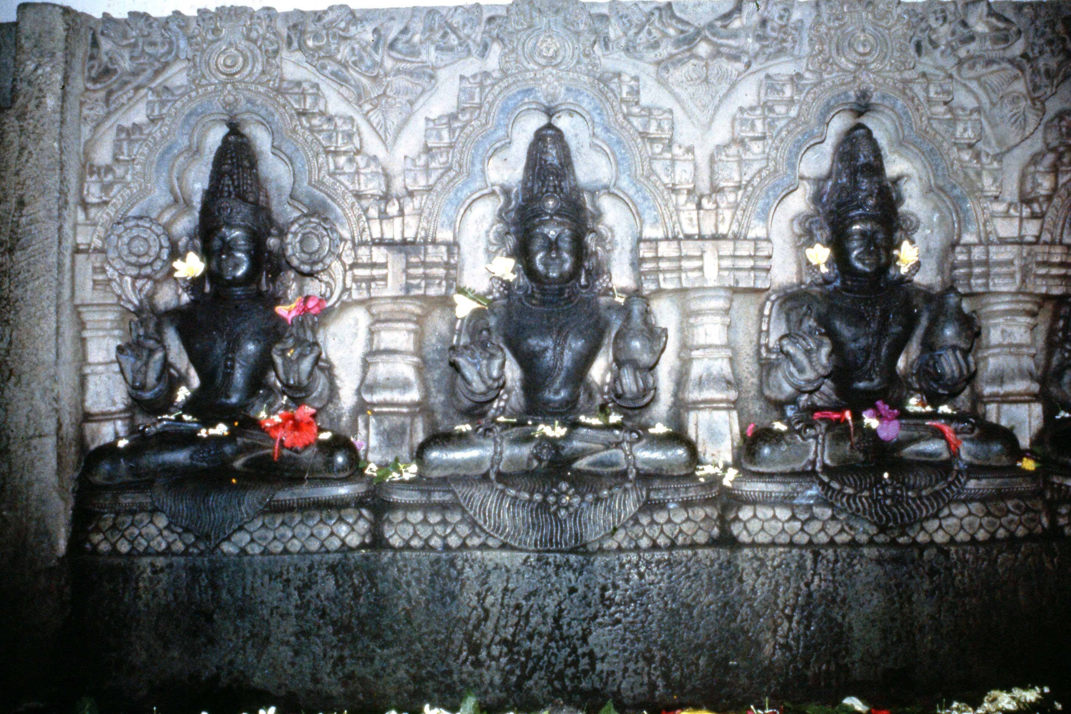 Orissa, Konark, Siglo XIII, Templo de Surya/Templo del sol, esculturas en la entrada del templo que representan a tres de los ocho planetas